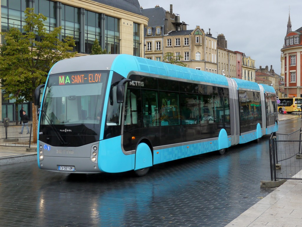 Van Hool Exquicity sur la ligne A du BHNS de Metz